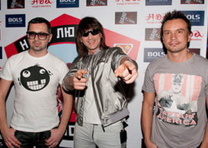 Группа «Дискотека Авария» на презентации нового клипа «Нано-Техно». 2011 год